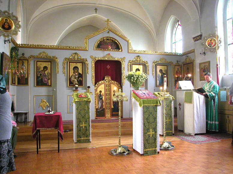 Maria-Obhut-Kirche in Düsseldorf